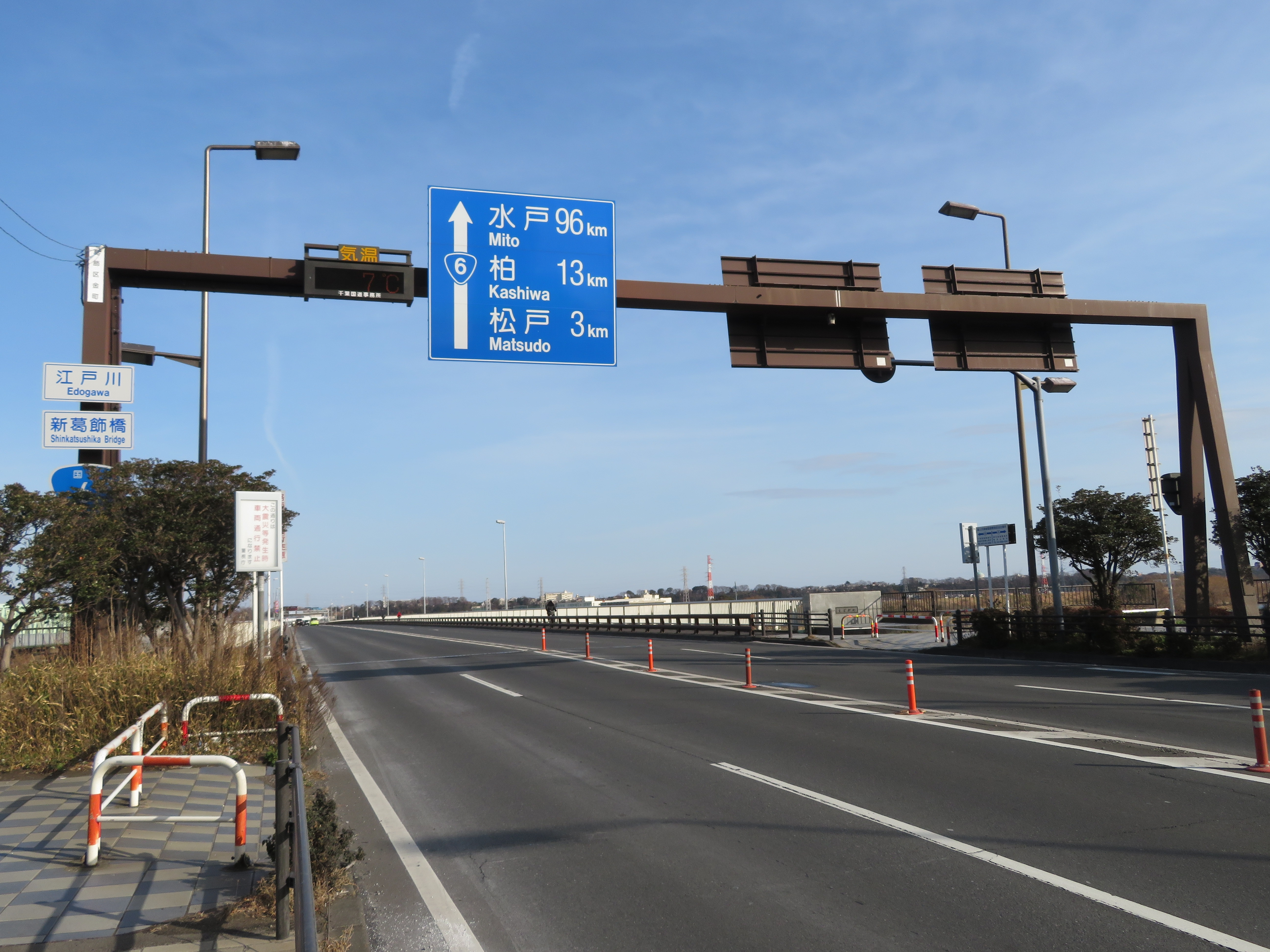 国道6号線金町バイパス 東京都葛飾区金町三丁目（新葛飾橋付近）柏方面を撮影 Canon PowerShot SX720 HS